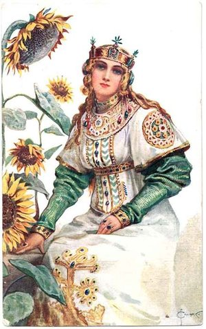 Забава Путятишна